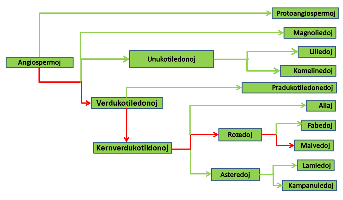 Filogenetika arbo pri malvedoj